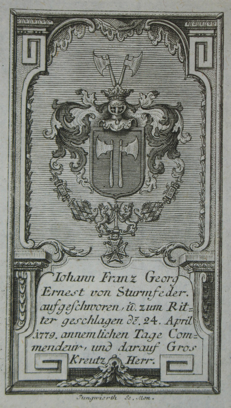 Wappen des Franz Georg Ernst von Sturmfeder (1727-1793) pfalz-bayerischer Kämmerer und St. Georgs-Ritter